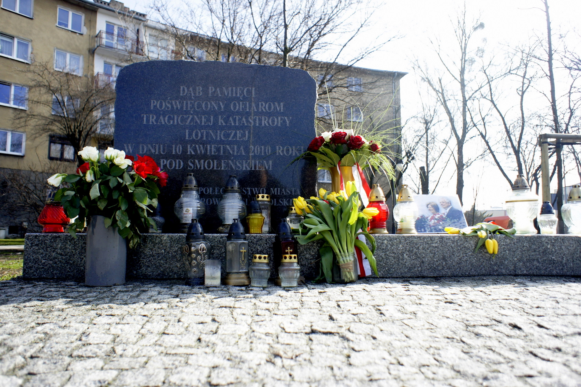 Ostrów Wlkp., skwer u zbiegu ulic: Sienkiewicza i Partyzanckiej - dąb pamięci upamiętniający ofiary katastrofy lotniczej w Smoleńsku